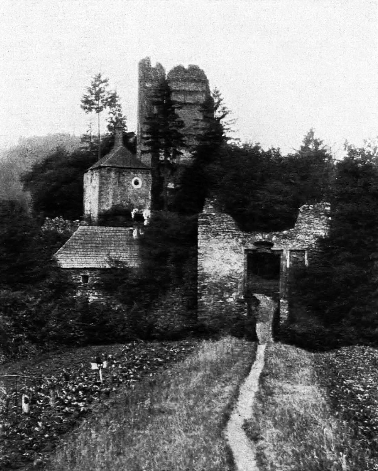 Alte Ansicht der Burgruine Wolfstein in Schönbühel-Aggsbach, Niederösterreich